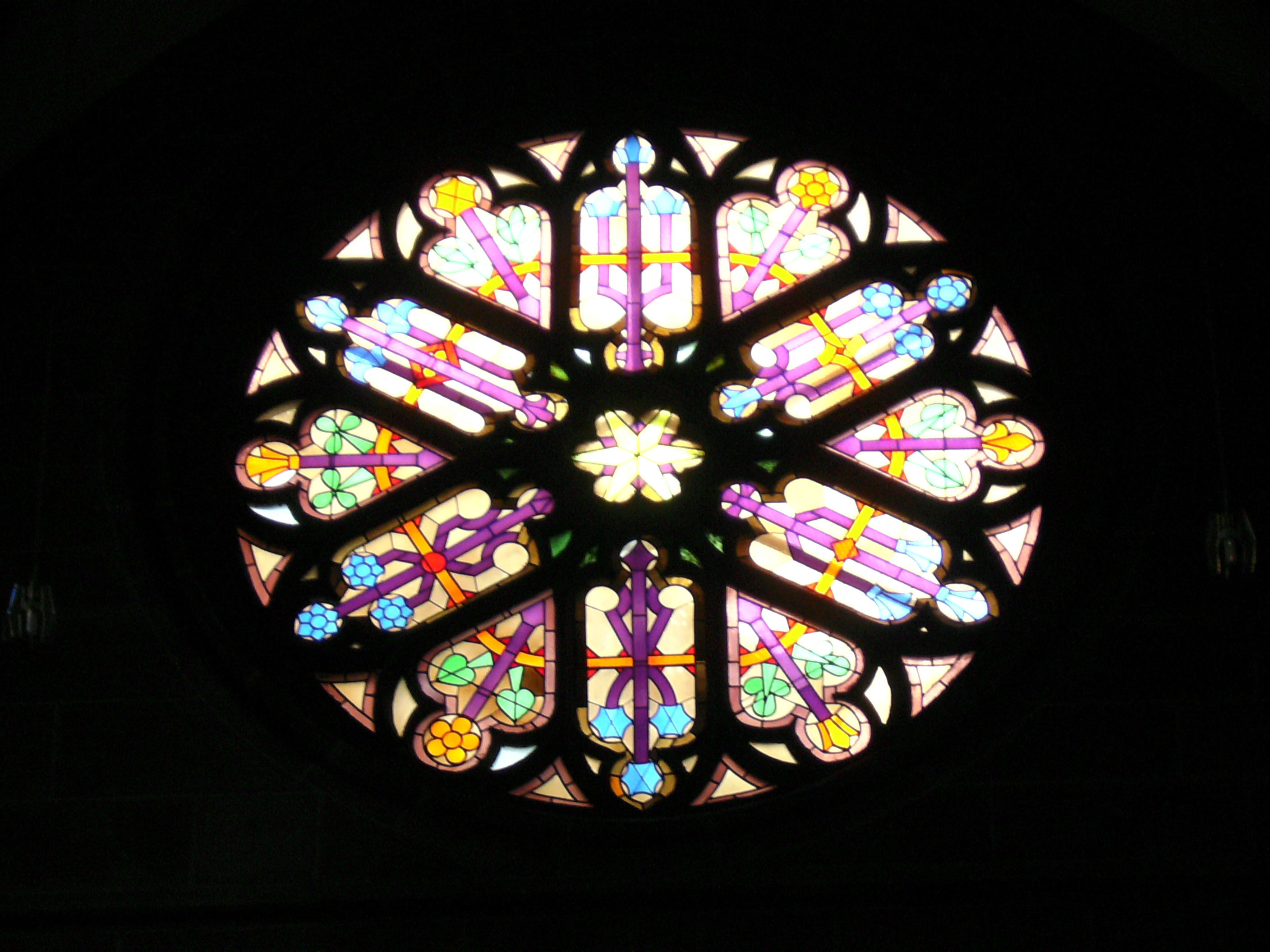 Rosette über dem Hauptportal im Schiff der Stiftskirche (Kaiserslautern)